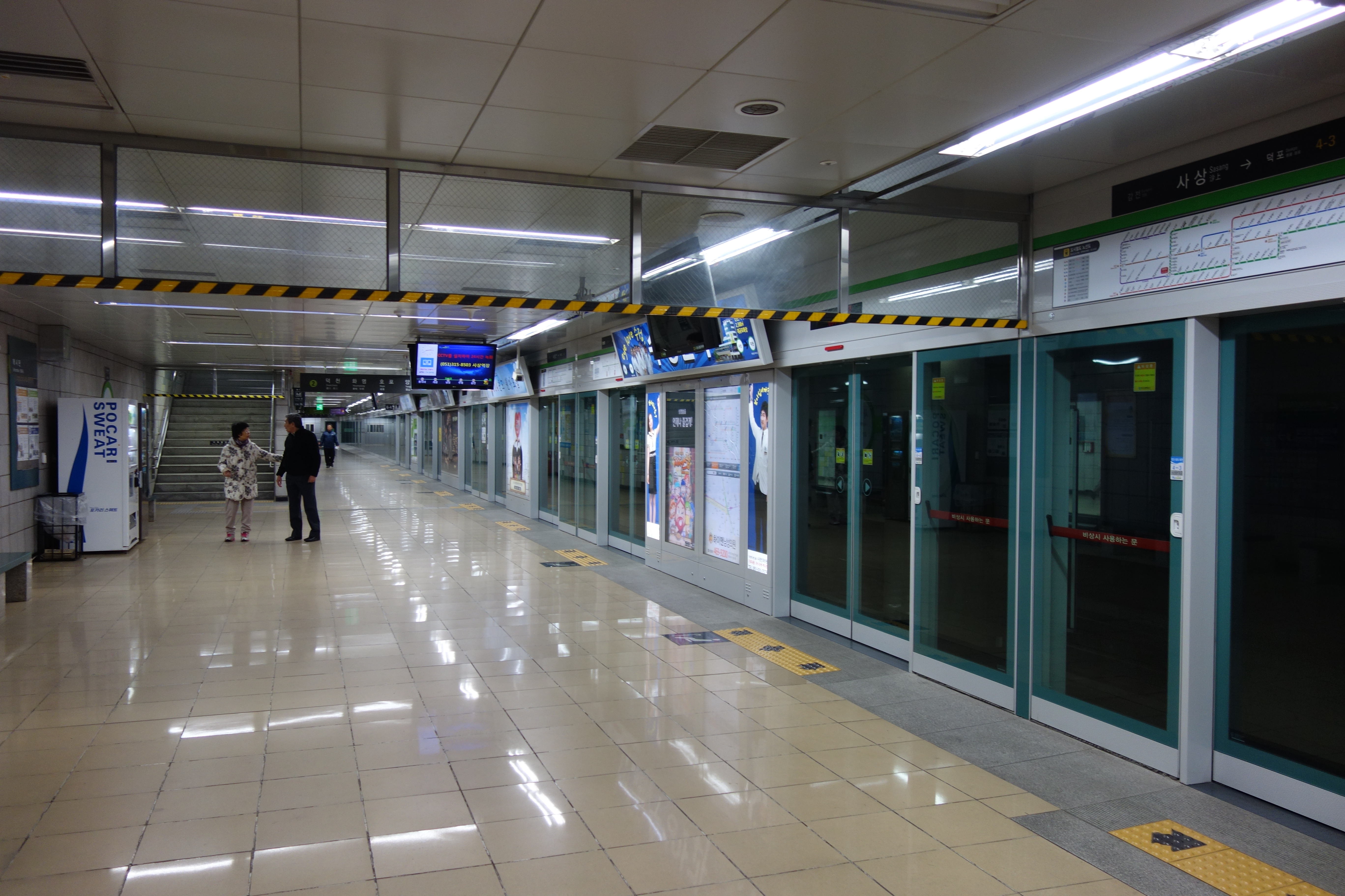 地下鉄2号線 沙上駅ホーム